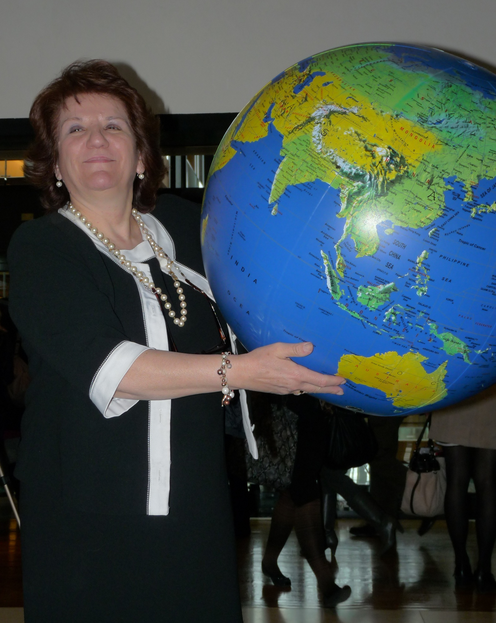 MEP Antigoni PAPADOPOULOU, Cyprus, S&D